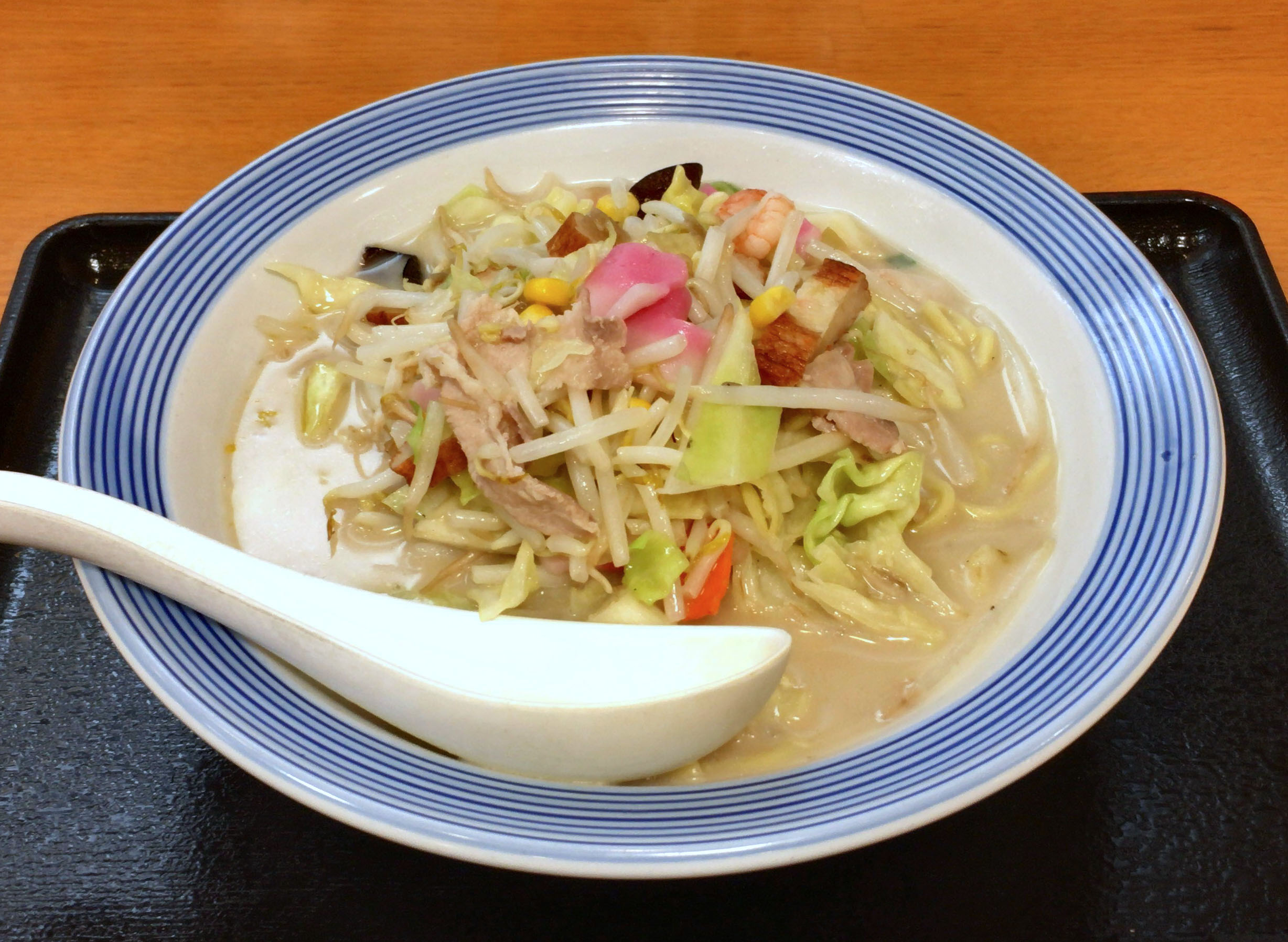 リンガーハットの長崎ちゃんぽん（並盛）